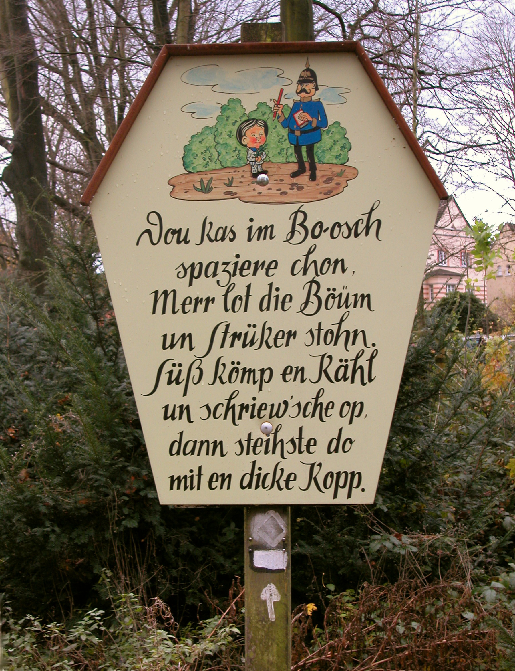 Mölmsch Platt am Eingang zum Witthausbusch Standort:51°24′58.8″N 6°53′51.2″E / 51.416333°N 6.897556°E